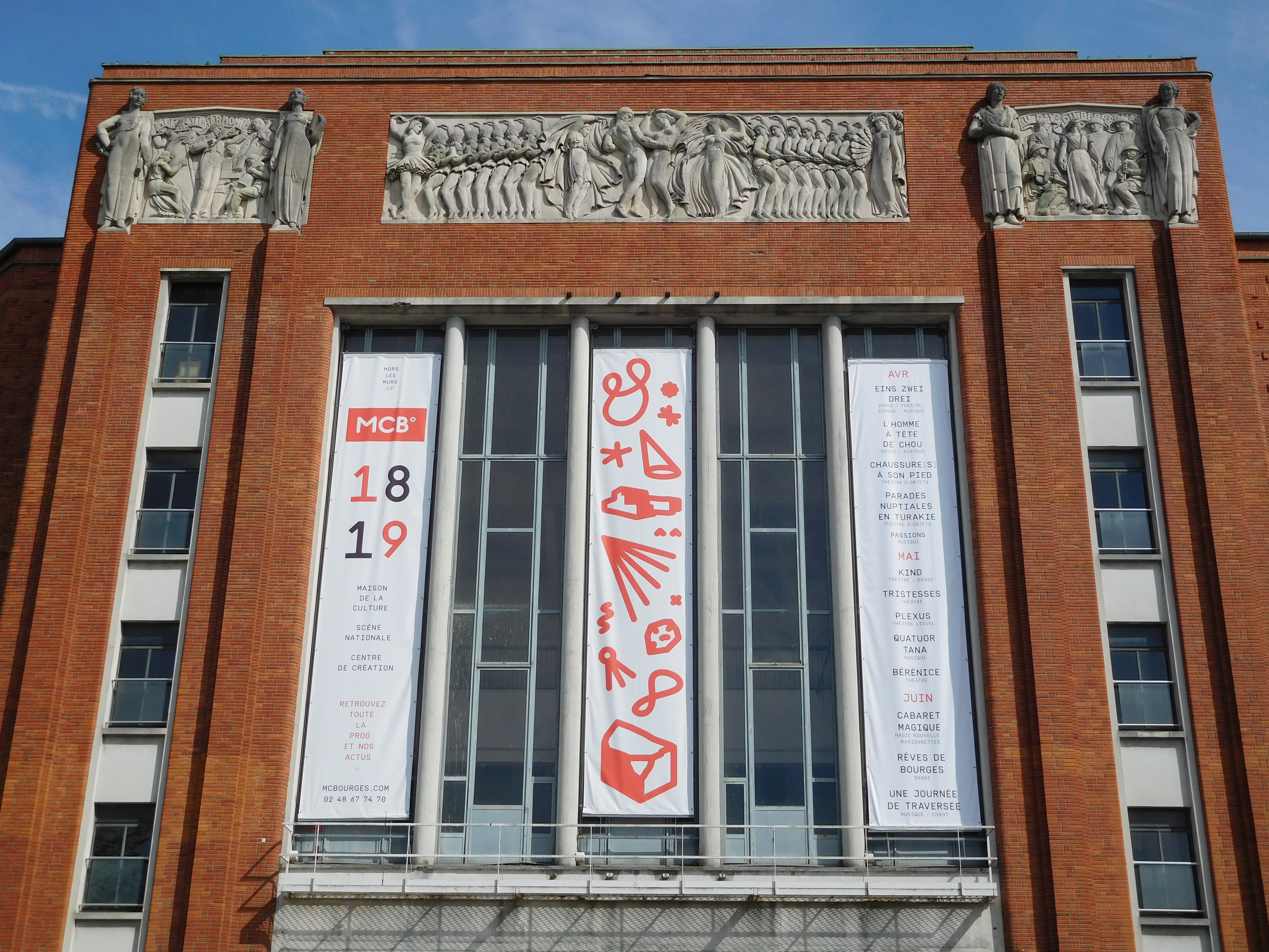 Publicité pour notamment L'Homme à tête de chou (terme visible en haut, à droite) : romance (danse/musique), chorégraphie par Jean-Claude Gallotta, une des sept créations du PDB 2019, en coproduction avec la Maison de la Culture de Bourges (MCB).